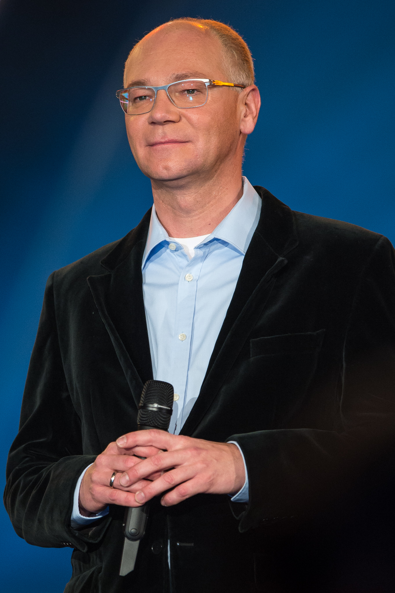 BR,Bayerisches Fernsehen,Frankenhalle,Live-Sendung,Martin Rassau,Sternstunden-Gala